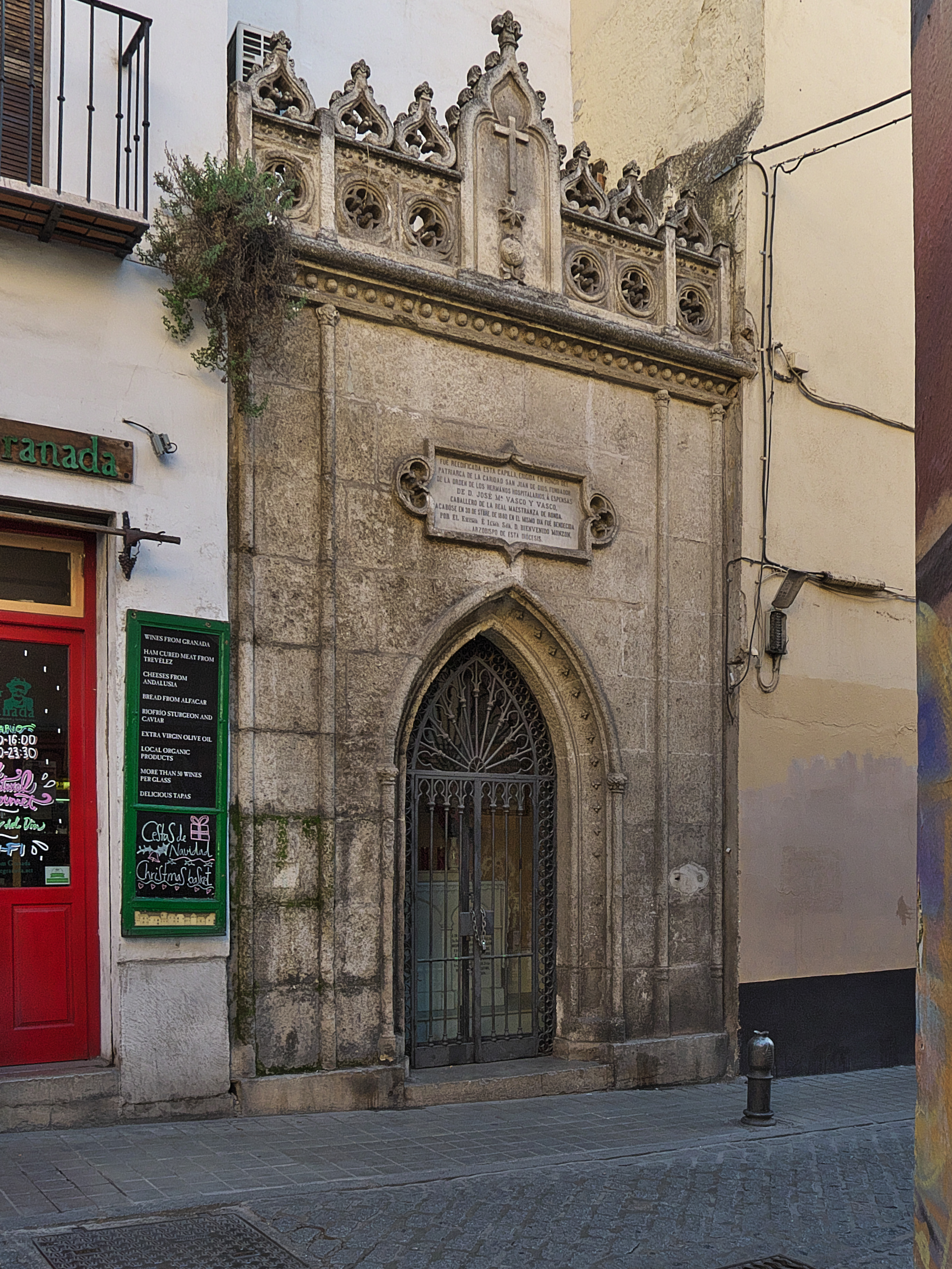 Capilla conmemorativa de una pequeña librería de libros religiosos (1538) de João Cidade Duarte (Juan de Dios).